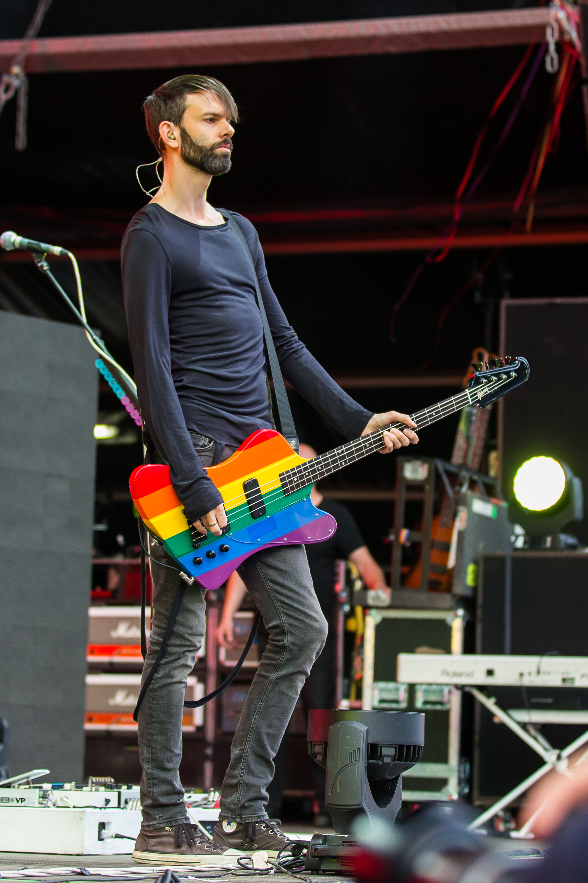 Rock'n'Heim Rock Festival Hockenheim August 2014